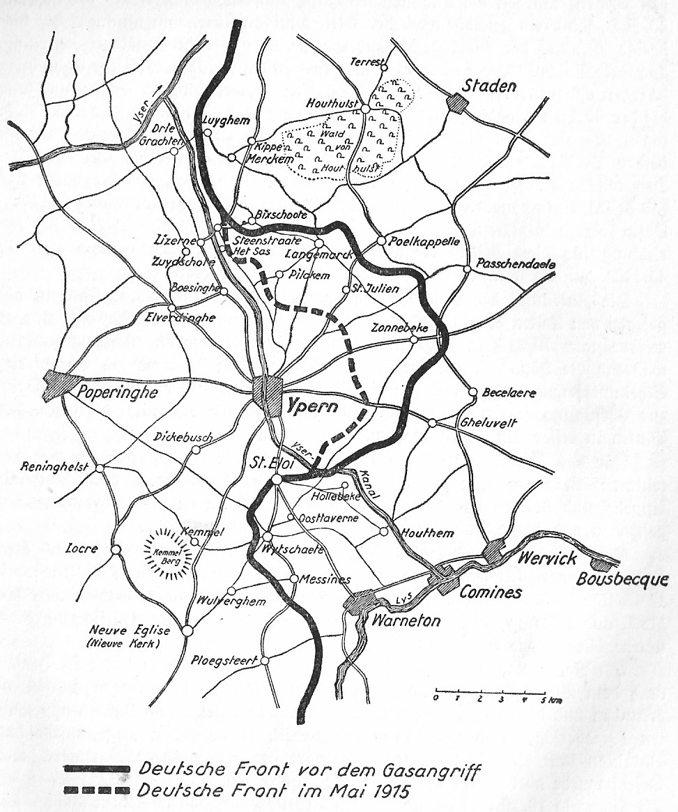 Ypernbogen